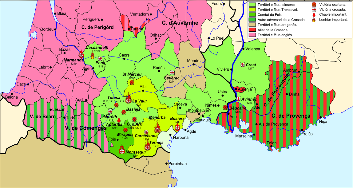 Esquèma generau de la Crosada deis Albigés.